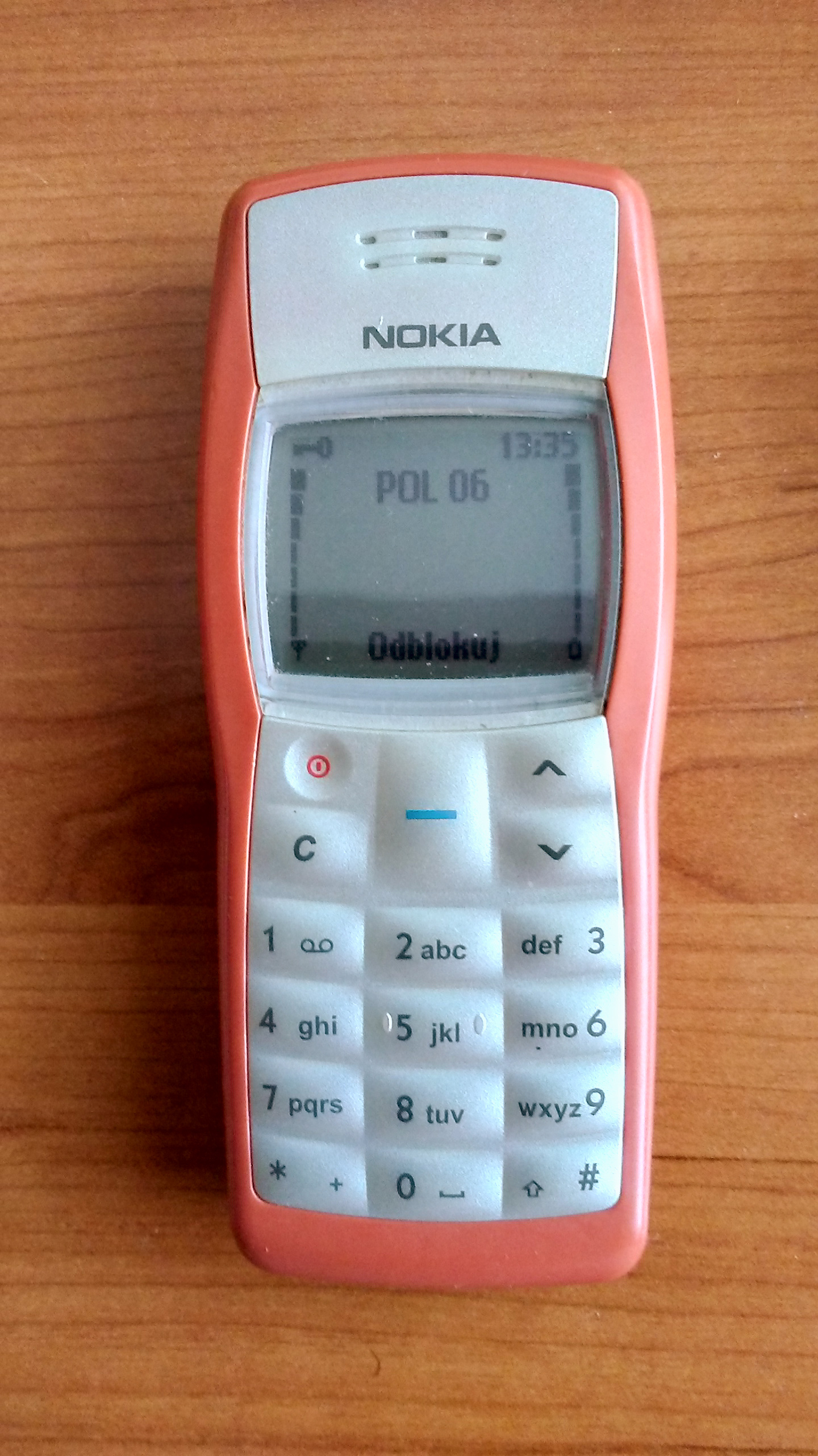 Nadal działajaca Nokia 1100 (2018 rok) Zakupiona w 2005 roku. Obecnie obsługuje polską sieć Play